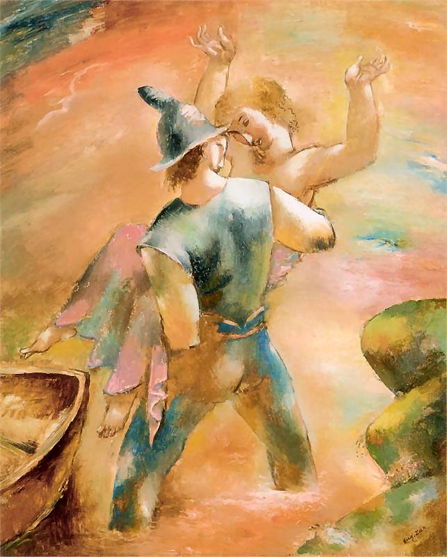 reprodukcja obrazu Eugeniusza Zaka